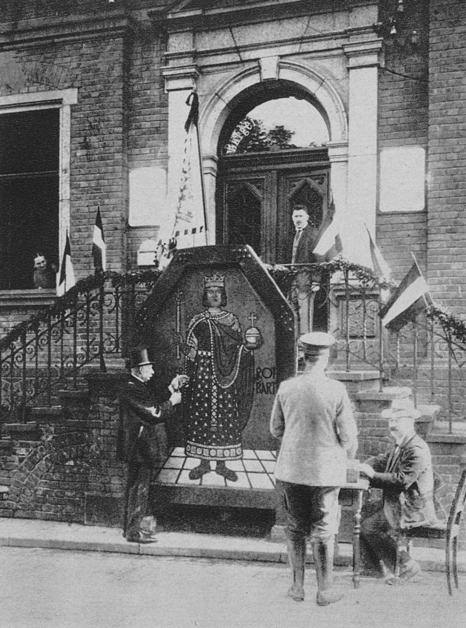 Das zur Nagelung bestimmte Barbarossabild vom Maler Gustav Wittschas (1868–1953) in Kaiserswerth. Foto Julius Söhn, 1. August 1915Gustav Wittschas geb. 1868 in Königsberg, Studium in Königsberg bei C. Steffeck und E. Neide, sowie in Düsseldorf.